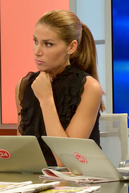 Ministro Díaz participa en noticiarios de Mega y TVN para explicar como se desarrolla el Proceso Constituyente